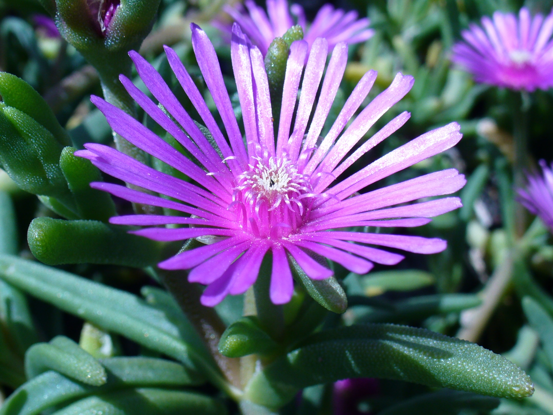 Delosperma lydenburgense flower